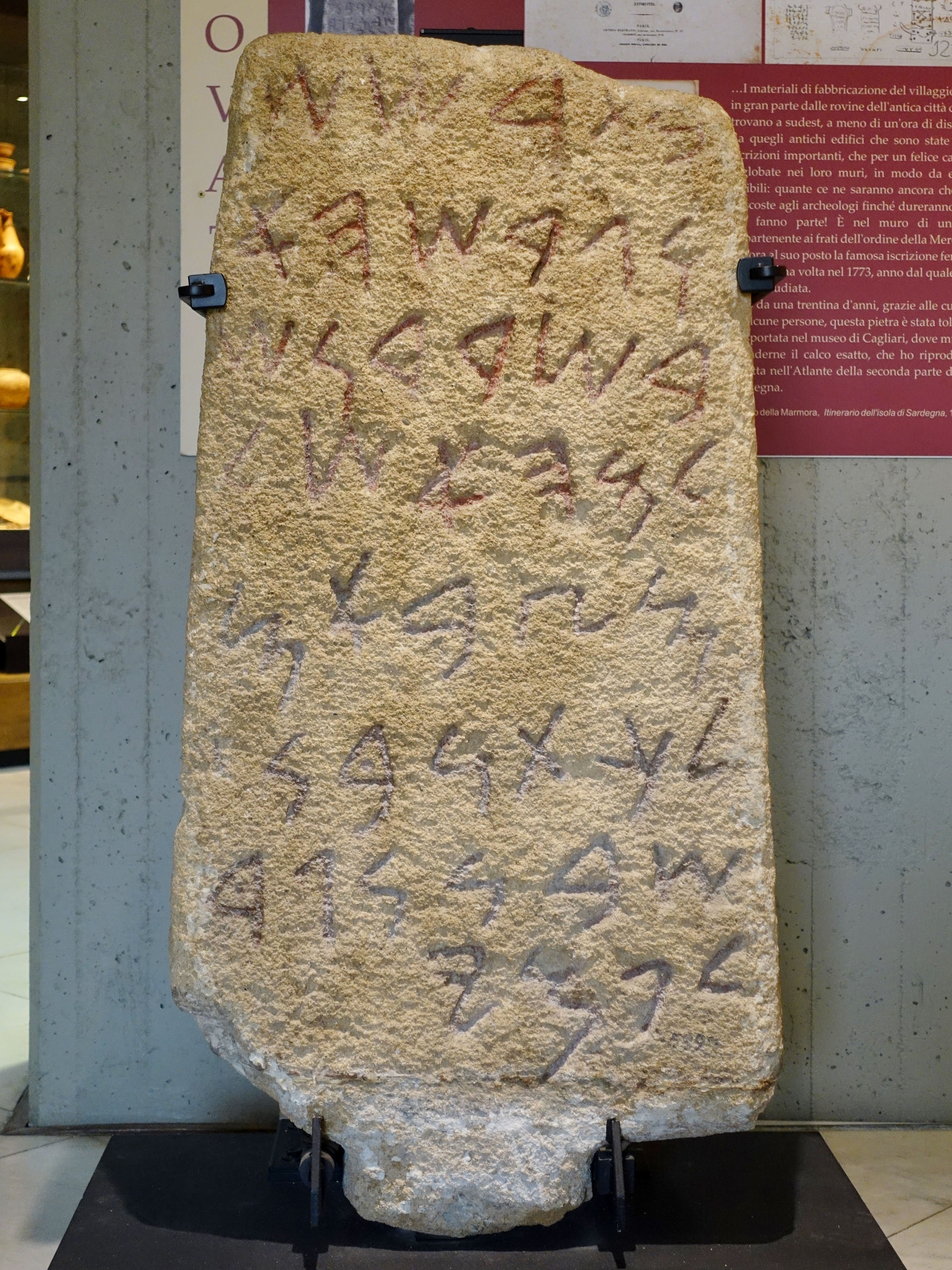 Stele von Nora, Gemeinde Pula, Archäologisches Nationalmuseum Cagliari, Sardinien, Italien